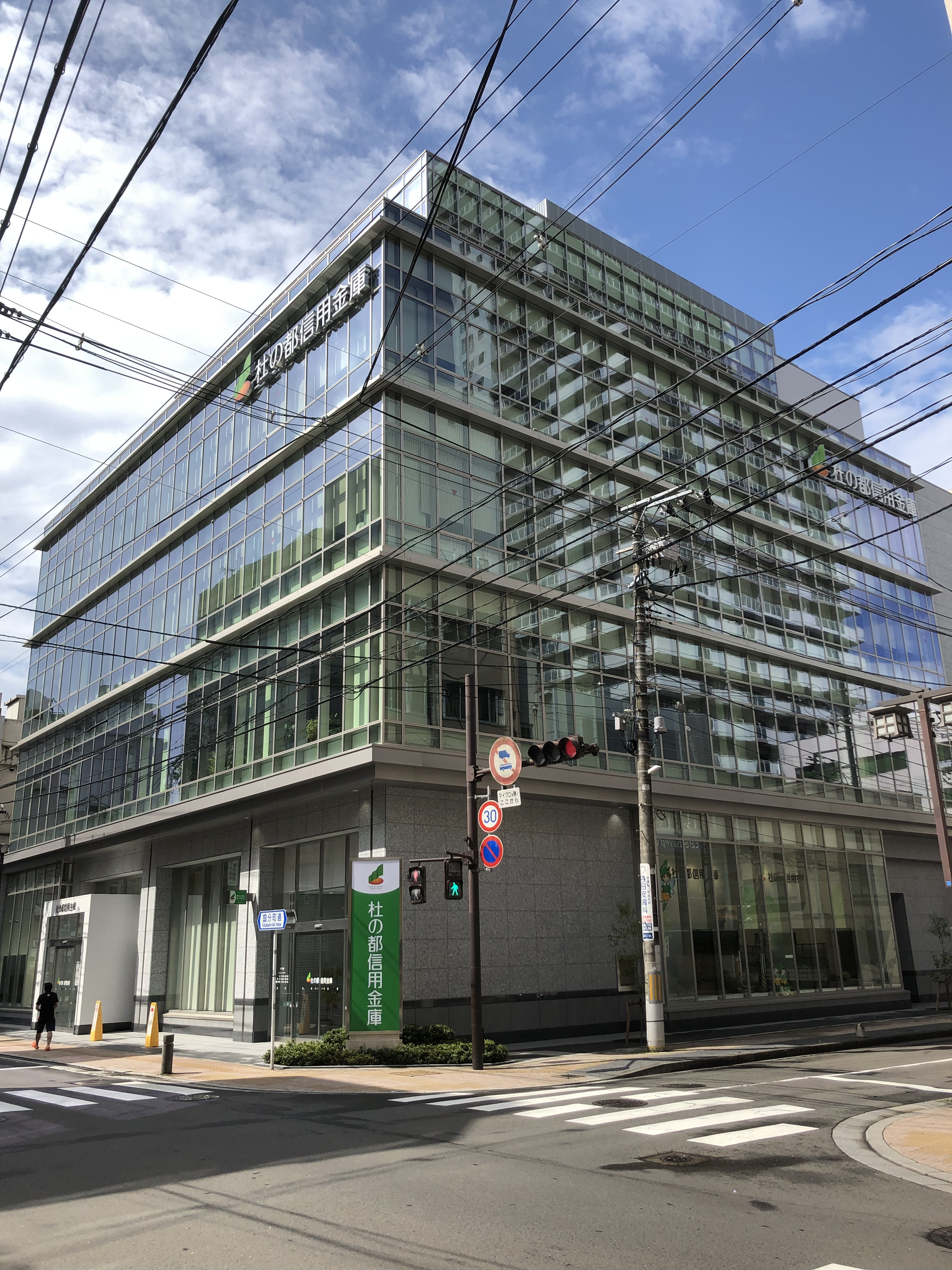 2019年に建てられた杜の都信用金庫本店ビル